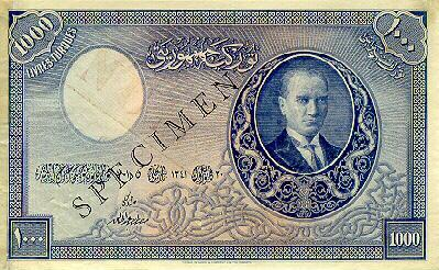 E1 serisi 1000 TL'nin ön yüzü